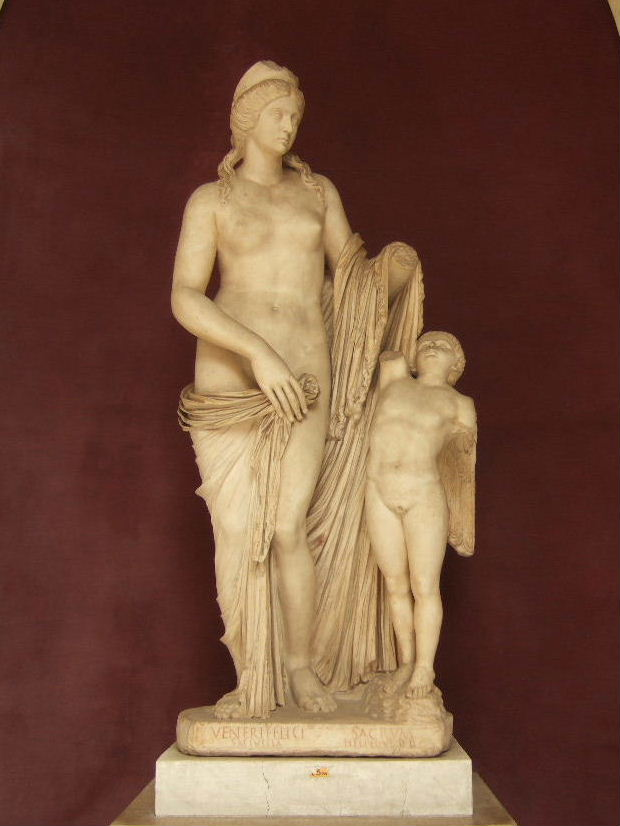 Venus und Amor - Vatikanisches Museum Rom